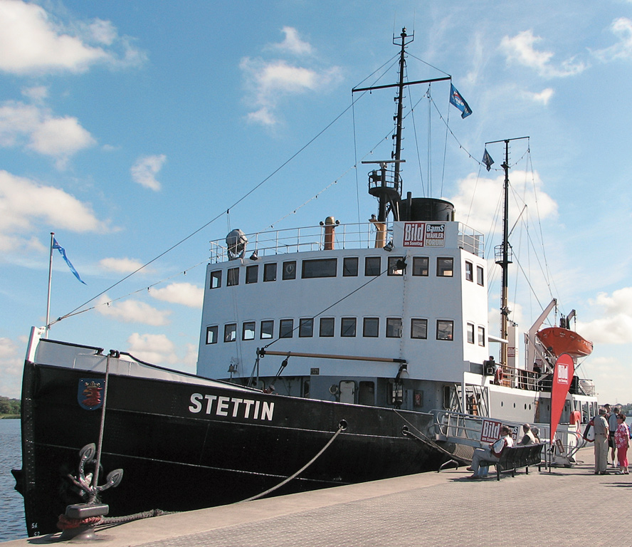 Beschreibung: Dampfeisbrecher Stettin im Rostocker Hafen Fotograf: Darkone, 17. August 2005